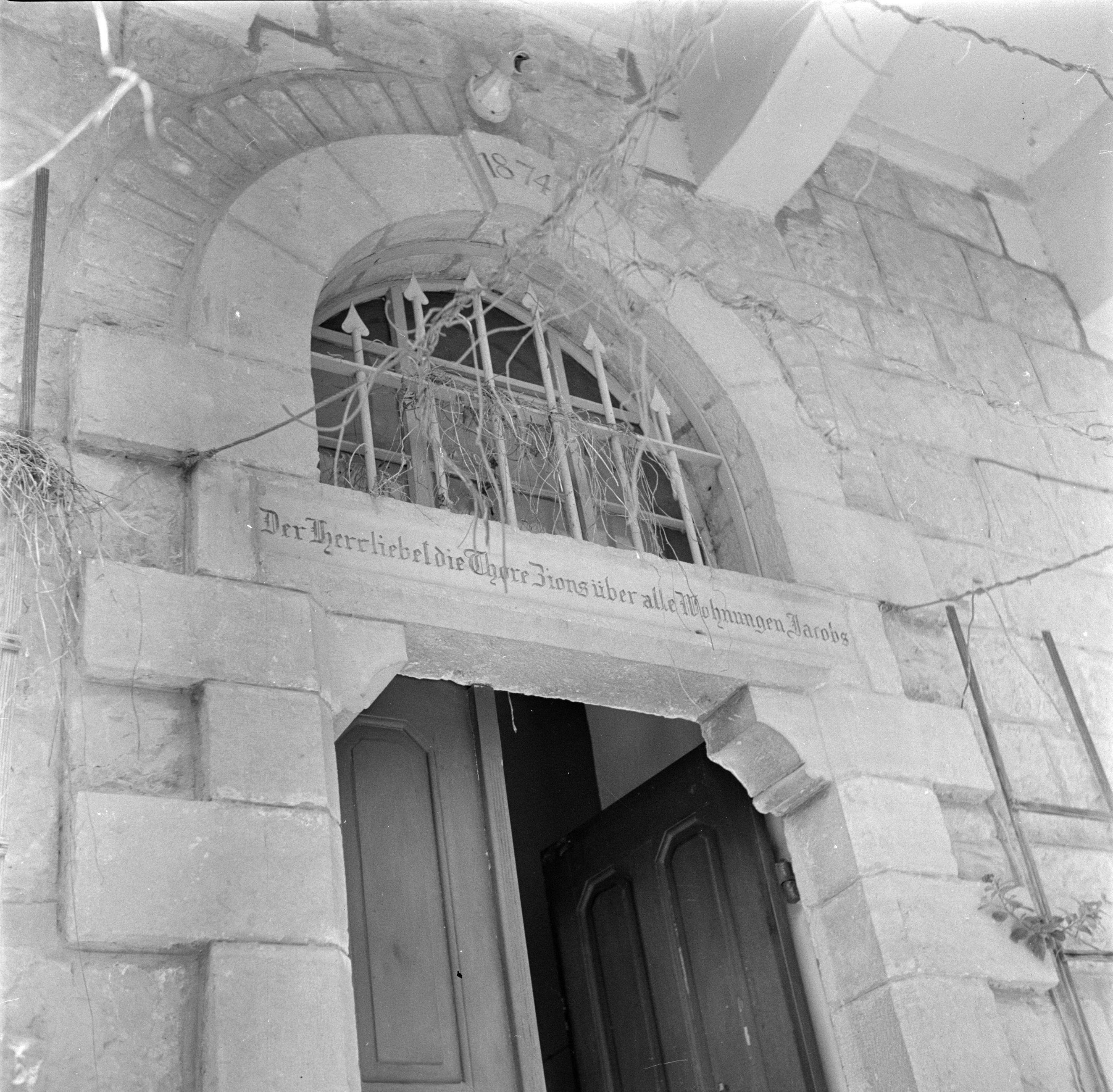 Collectie / Archief : Fotocollectie Van de Poll Reportage / Serie : Israël 1948-1949: Jeruzalem Beschrijving : Toegangspoort met daarboven gebeiteld de spreuk "Der Herr liebet die Thore Zions über alle Wohnungen Jacobs" Annotatie : De spreuk "Der Herr liebet die Thore Zions über alle Wohnungen Jacobs" (Boven alle steden van Jakob heeft de Heer de poorten van Sion lief) is afkomstig uit psalm 87 vers 2 Datum : 1948 Locatie : Israël, Jeruzalem Trefwoorden : deuren, religieuze liederen Fotograaf : Poll, Willem van de Auteursrechthebbende : Nationaal Archief Materiaalsoort : Negatief (zwart/wit) Nummer archiefinventaris : bekijk toegang 2.24.14.02 Bestanddeelnummer : 255-0339